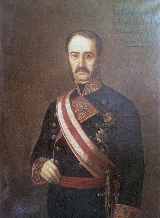 Isidoro de Hoyos (1793–1876)